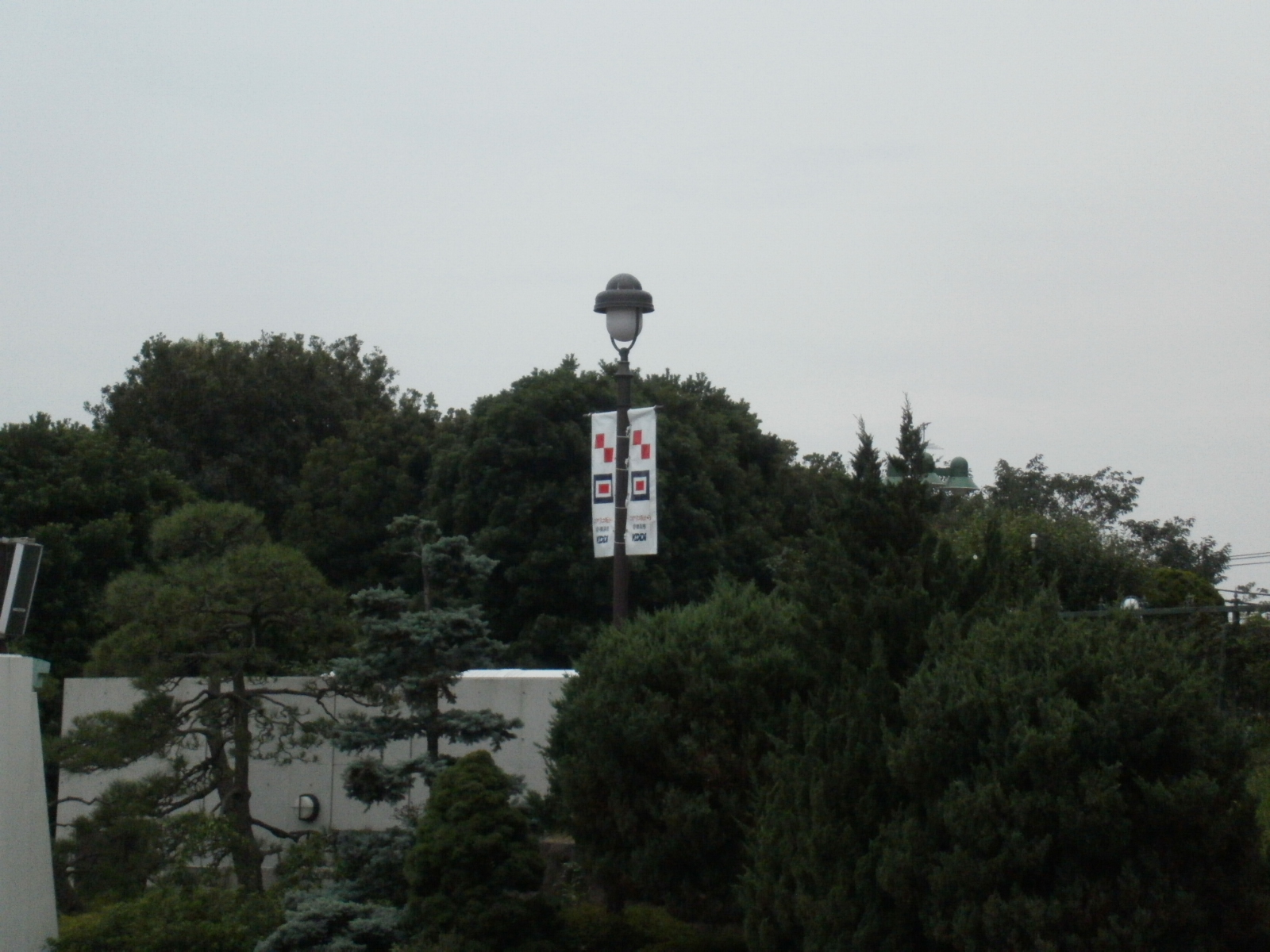 橫濱觀港公園(港の見える丘公園)中，掛著國際信號旗U旗與W旗的街燈。